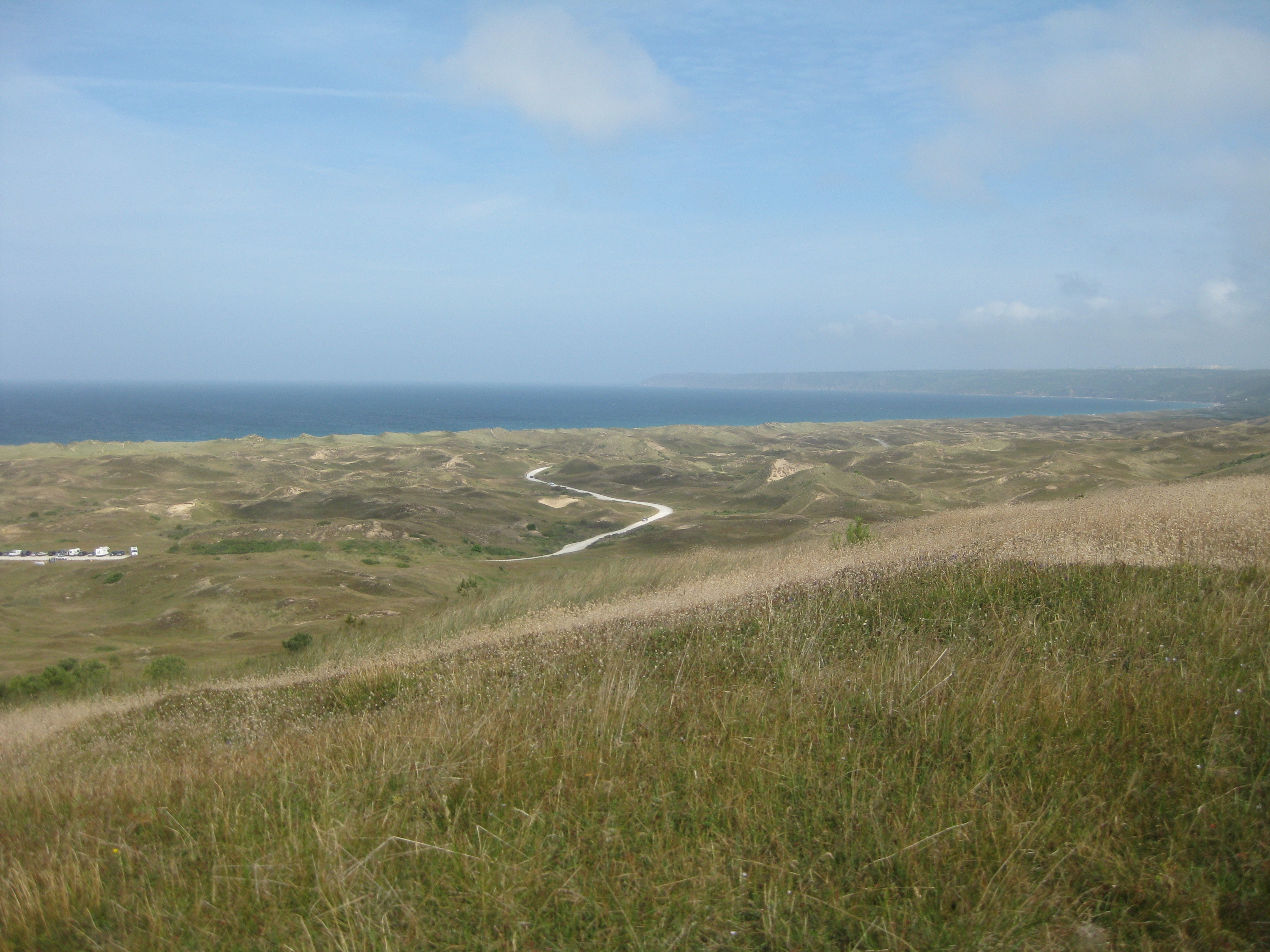 les dunes recouvertes de vegetation et la mer à l'horizon sous un beau ciel bleu